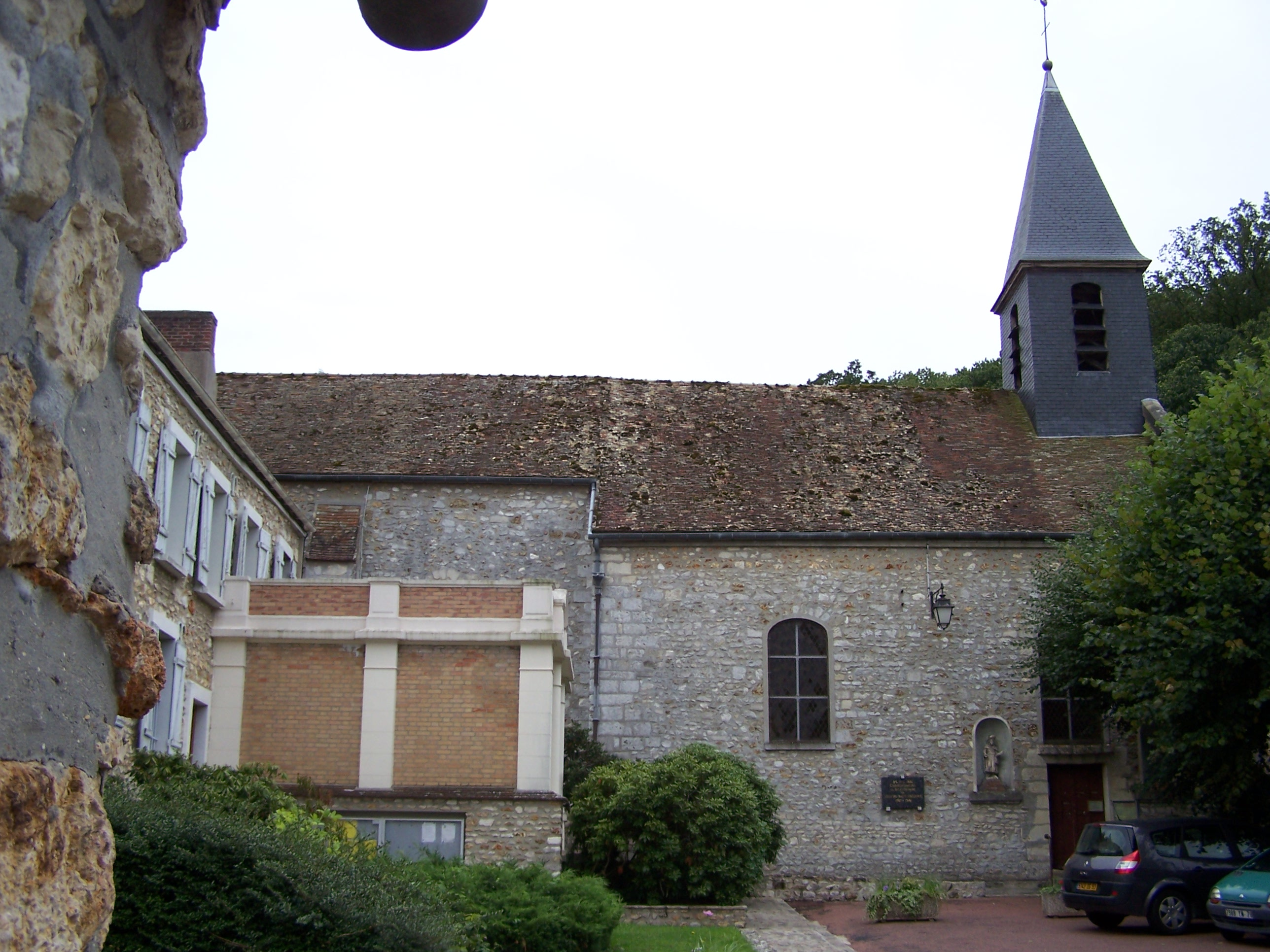 Église Saint-Frédéric de Villiers-Saint-Frédéric (Yvelines, France). Photo personnelle. Church of Villiers-Saint-Frédéric (Yvelines, France). Personal photo. Auteur/Author : Henry Salomé